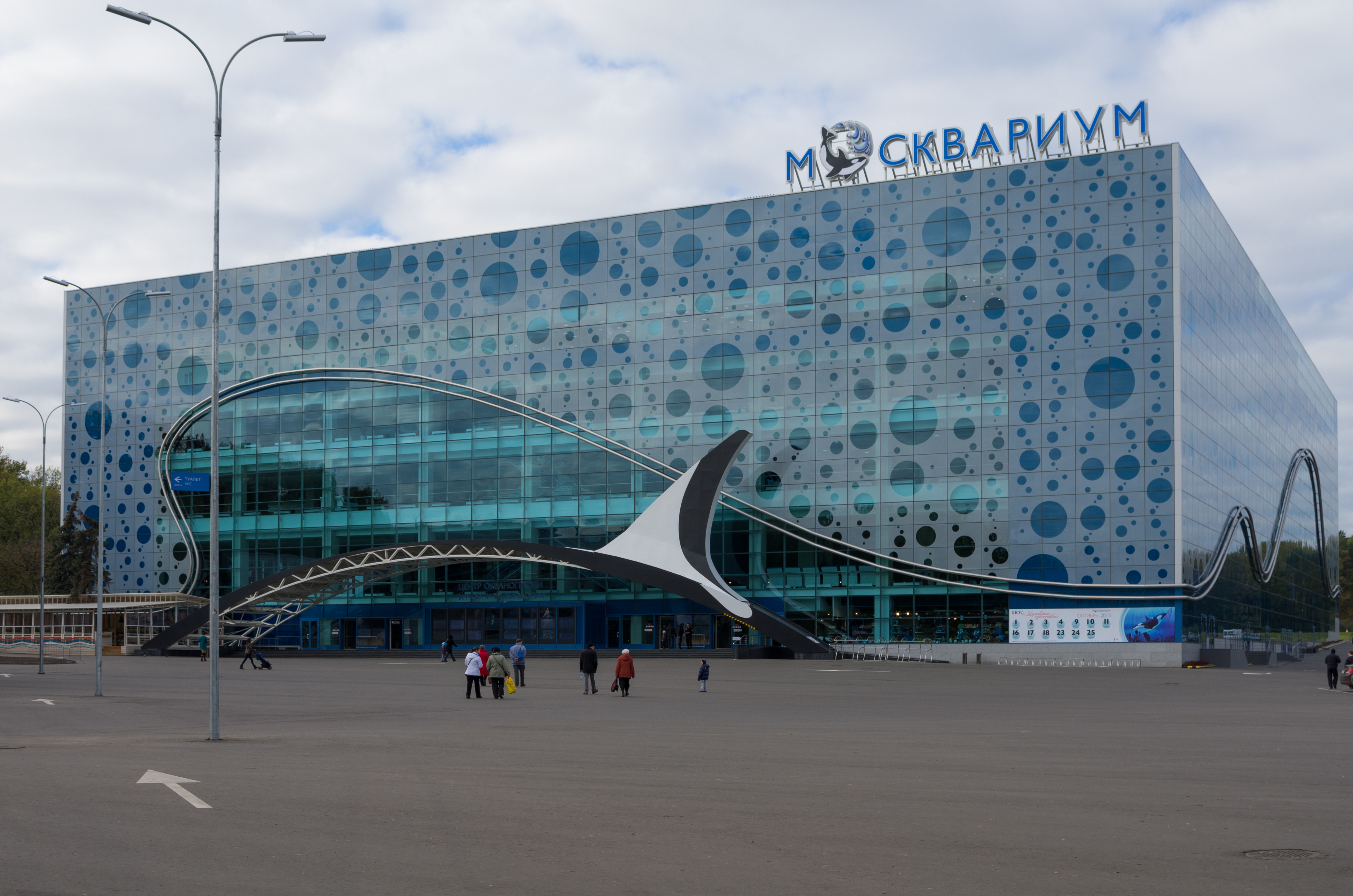 Фасад центра океанографии и морской биологии «Москвариум»